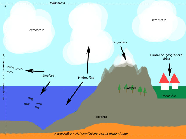 Landscape sphere scheme